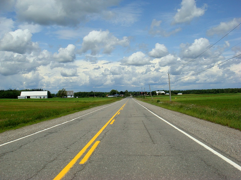 Photo de la route 275, à Saint-Isidore, Québec, Canada.